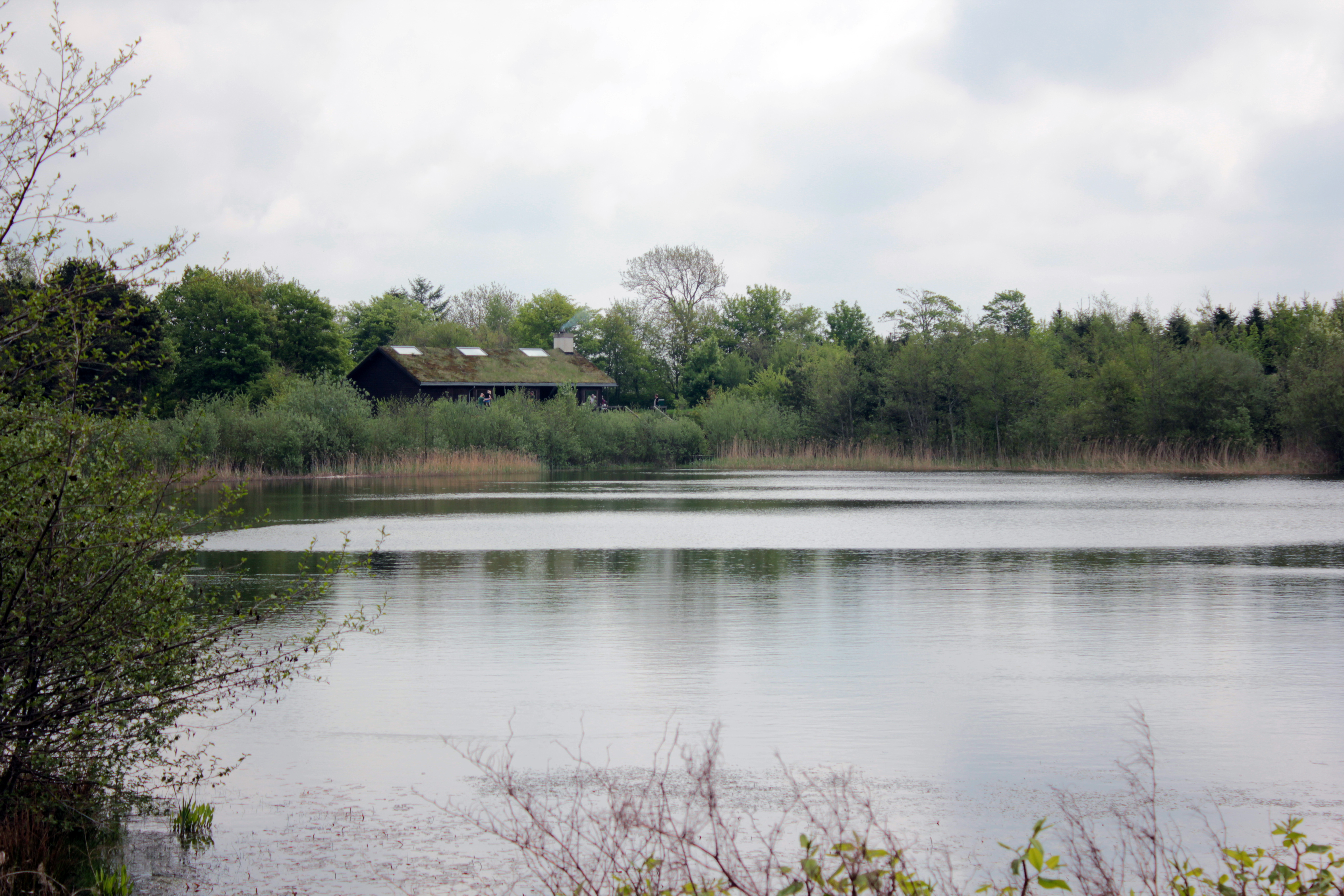 Bratbjergsøerne med huset i baggrunden. De tidligere grusgrave blev fyldt med vand omkirng år 2000 og er nu en del af et nyt offentligt rekreativt område.